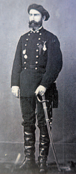 Militar carlista